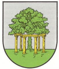 Wappen von Körborn